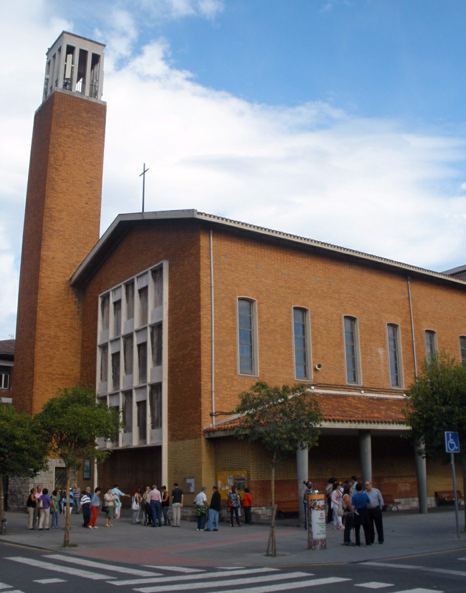 Iglesia de San José, en Romo, Las Arenas, Guecho (Vizcaya)